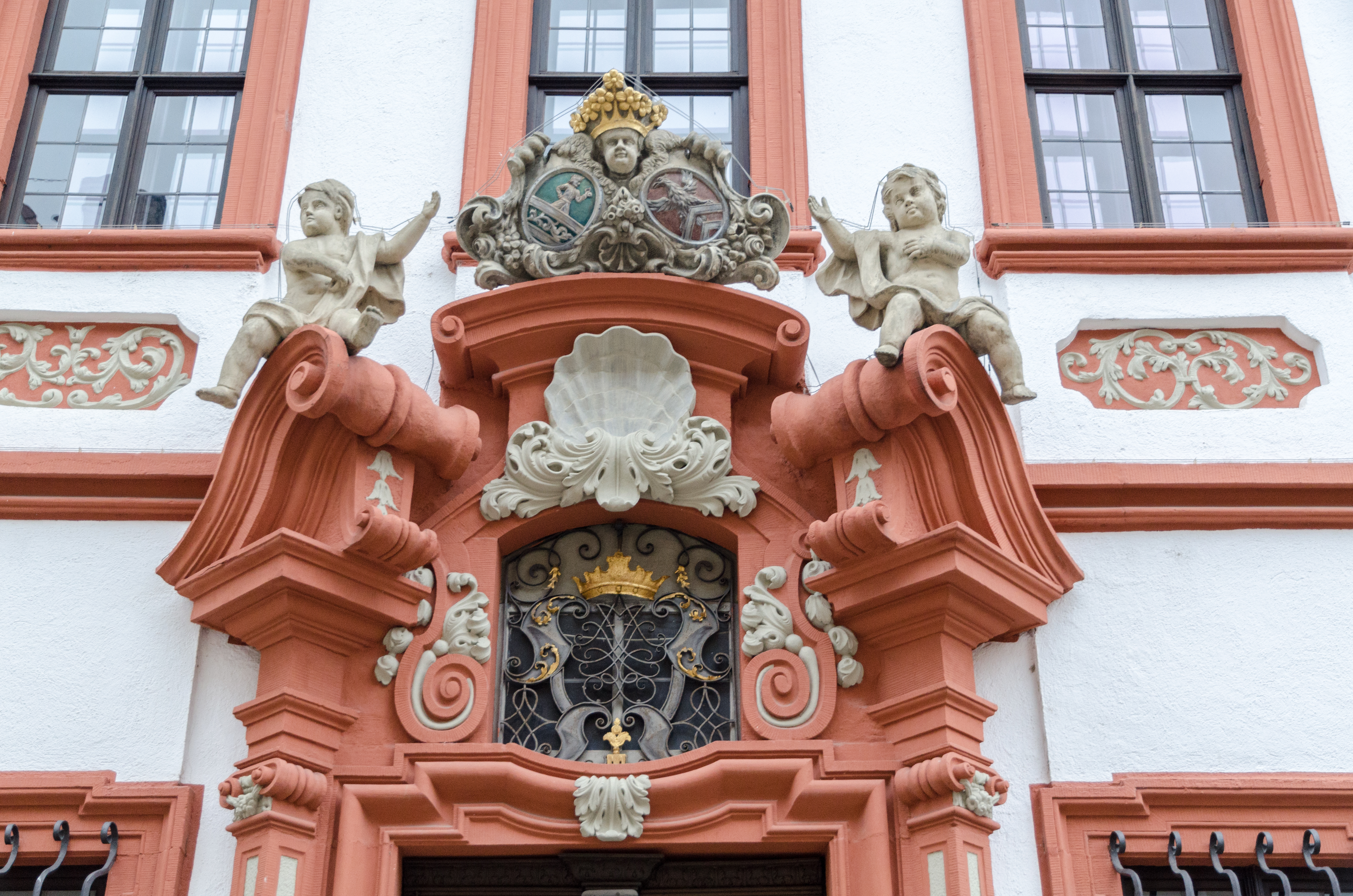 Volkach, Schelfengasse 1